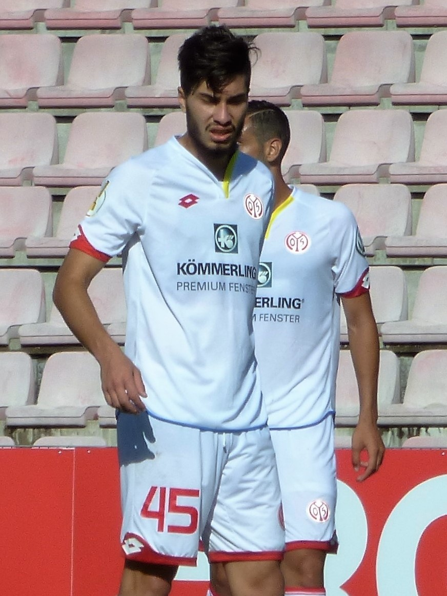 Serdar, Suat Mainz 16-17